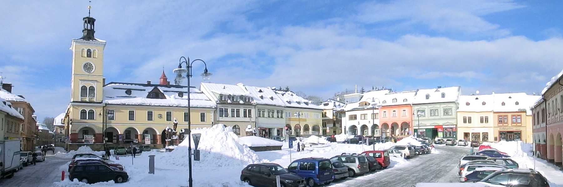 Česky: Náměstí v Jilemnici - panoramatický záběr severozápadního rohu